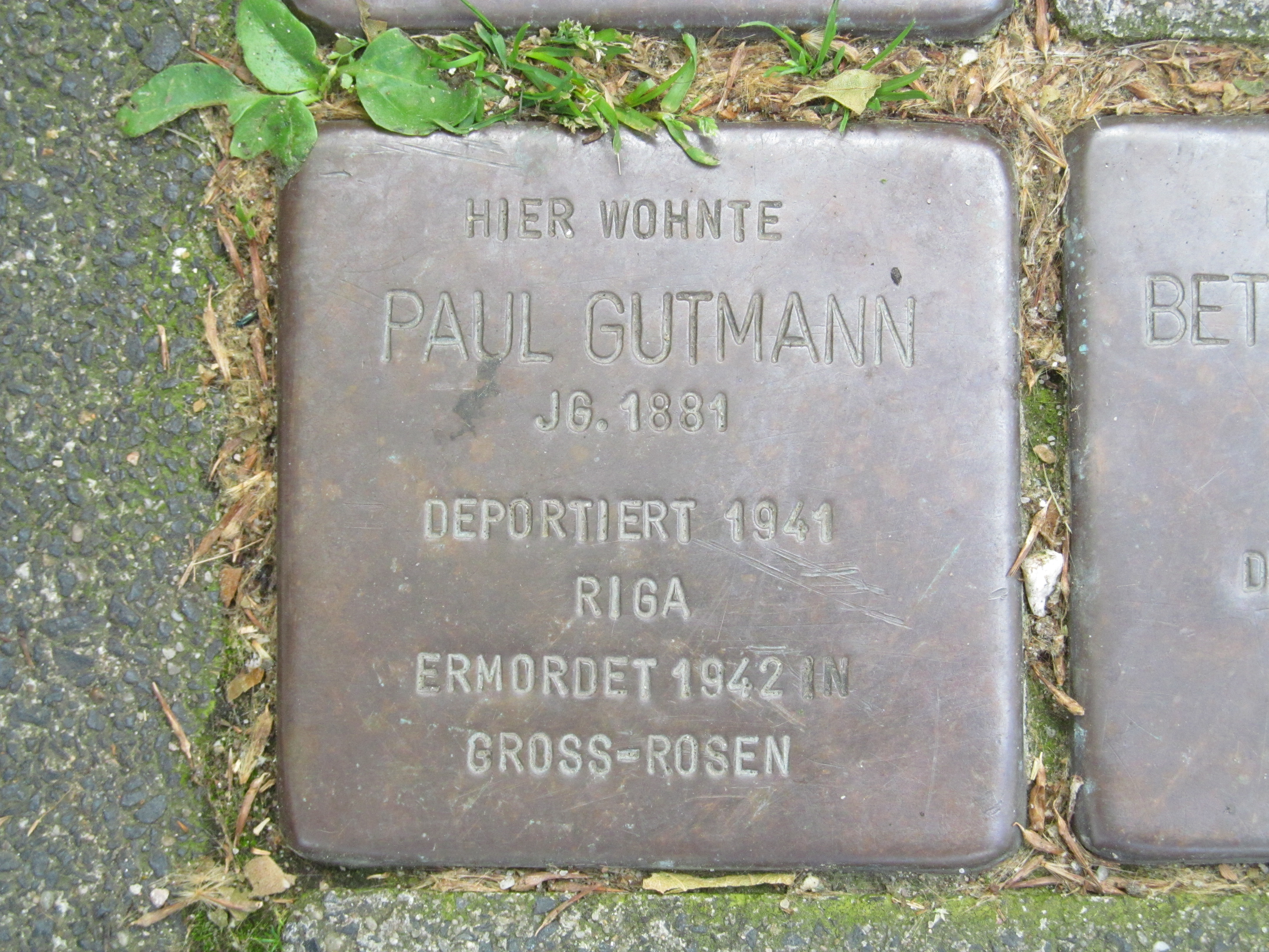 der Stolperstein für Paul Gutmann vor dem Haus Rheinstraße 27 in Duisburg-Homberg